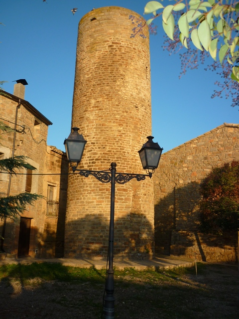 Torre 1 - Vilamajor Cabanabona